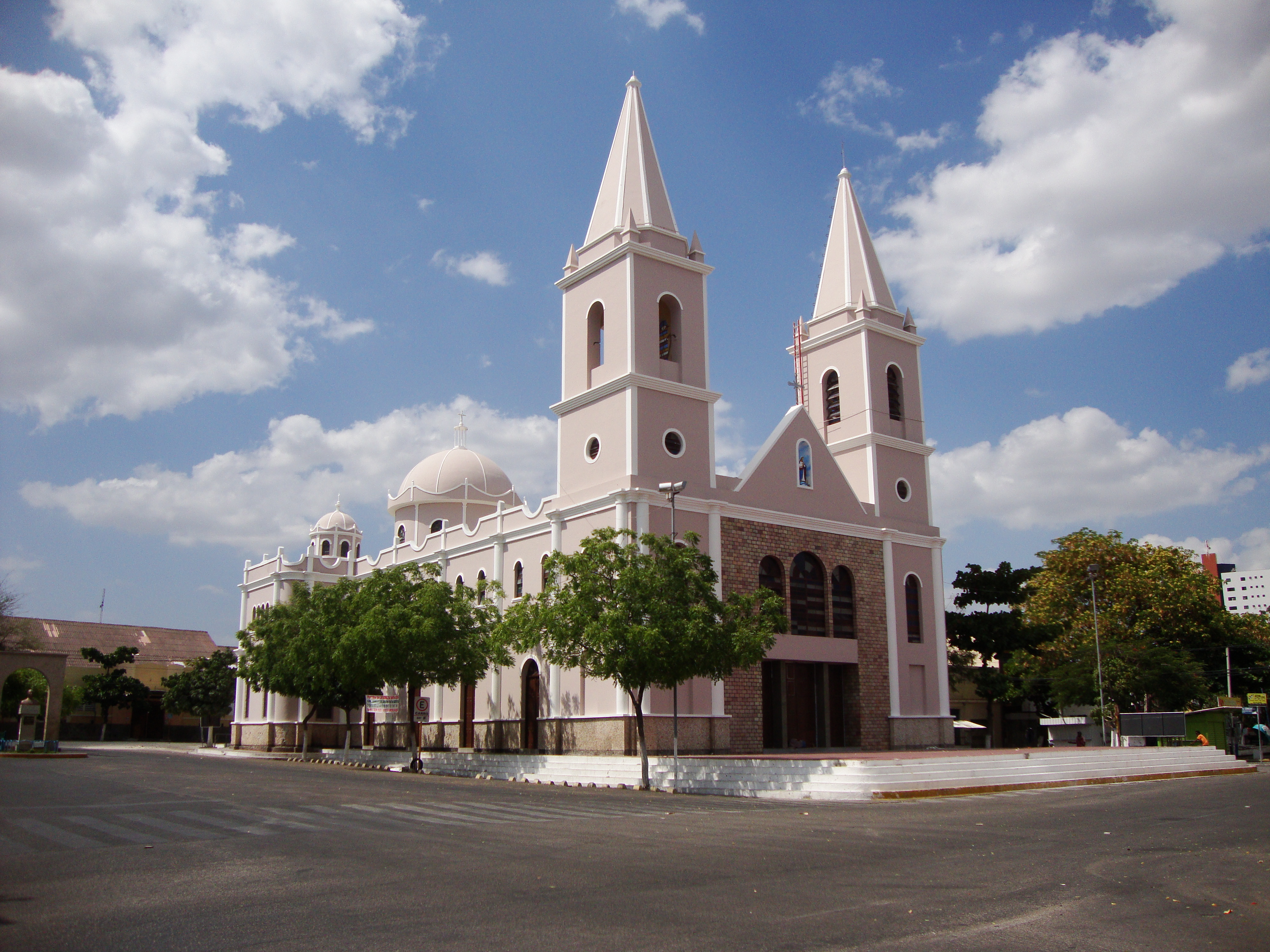 Catedral de Santa Luzia em Mossoró - RN